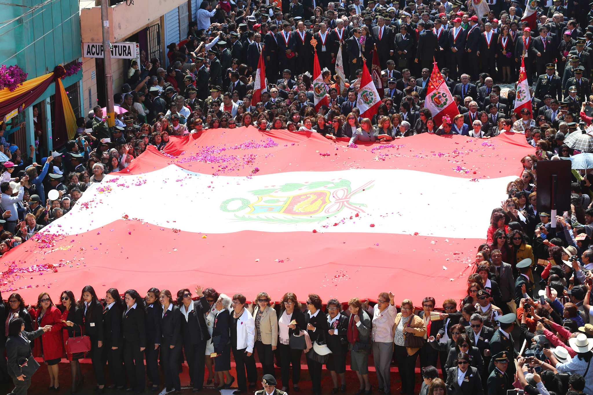 Procesión de la bandera